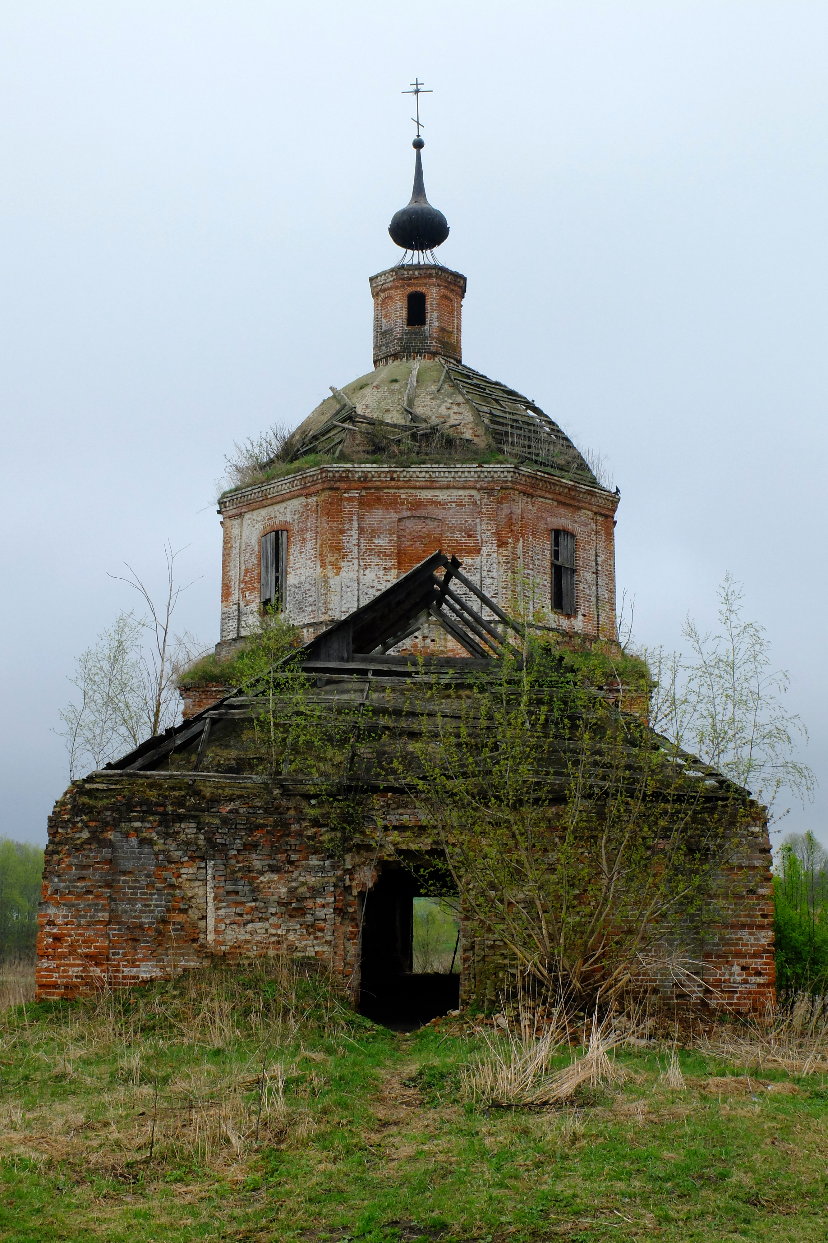 Церковь Рождества Богородицы: Сорогужино, Юрьев-Польский район, Владимирская область